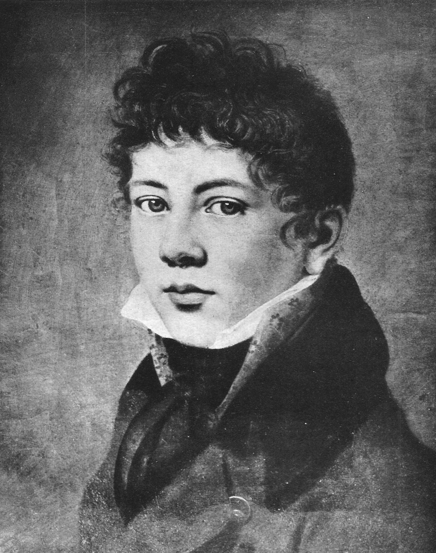 Karl Schiller (Öl auf Leinwand)